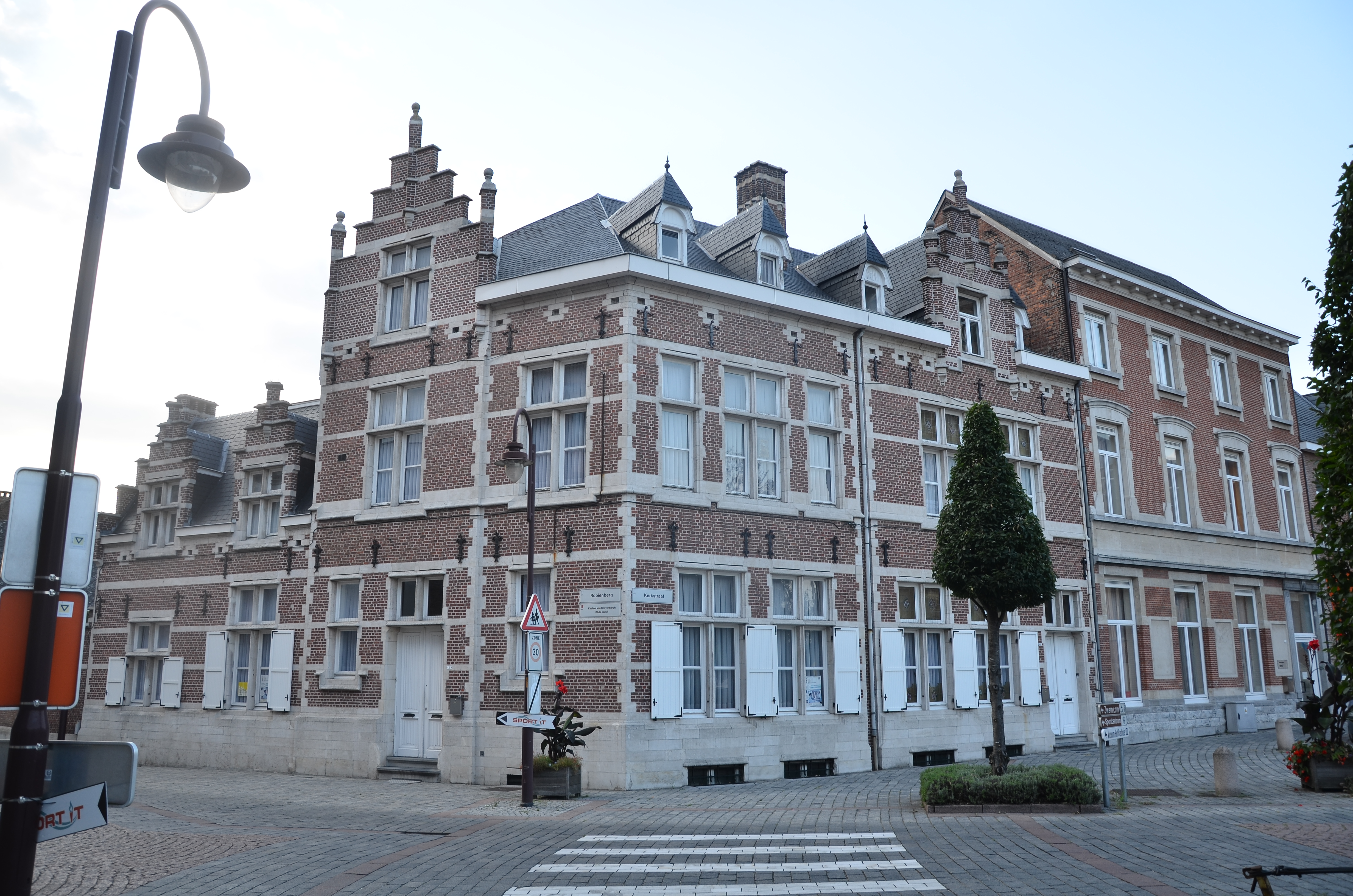 Neotraditionele woning